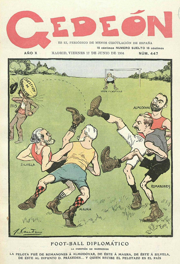 Portada del 17 de junio de 1904 de la revista satírica española Gedeón, Foot-ball diplomático.